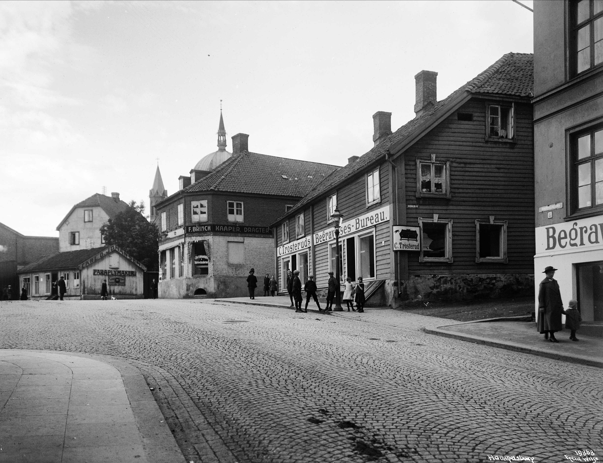 Hospitalsgata 8-14 anno 1918